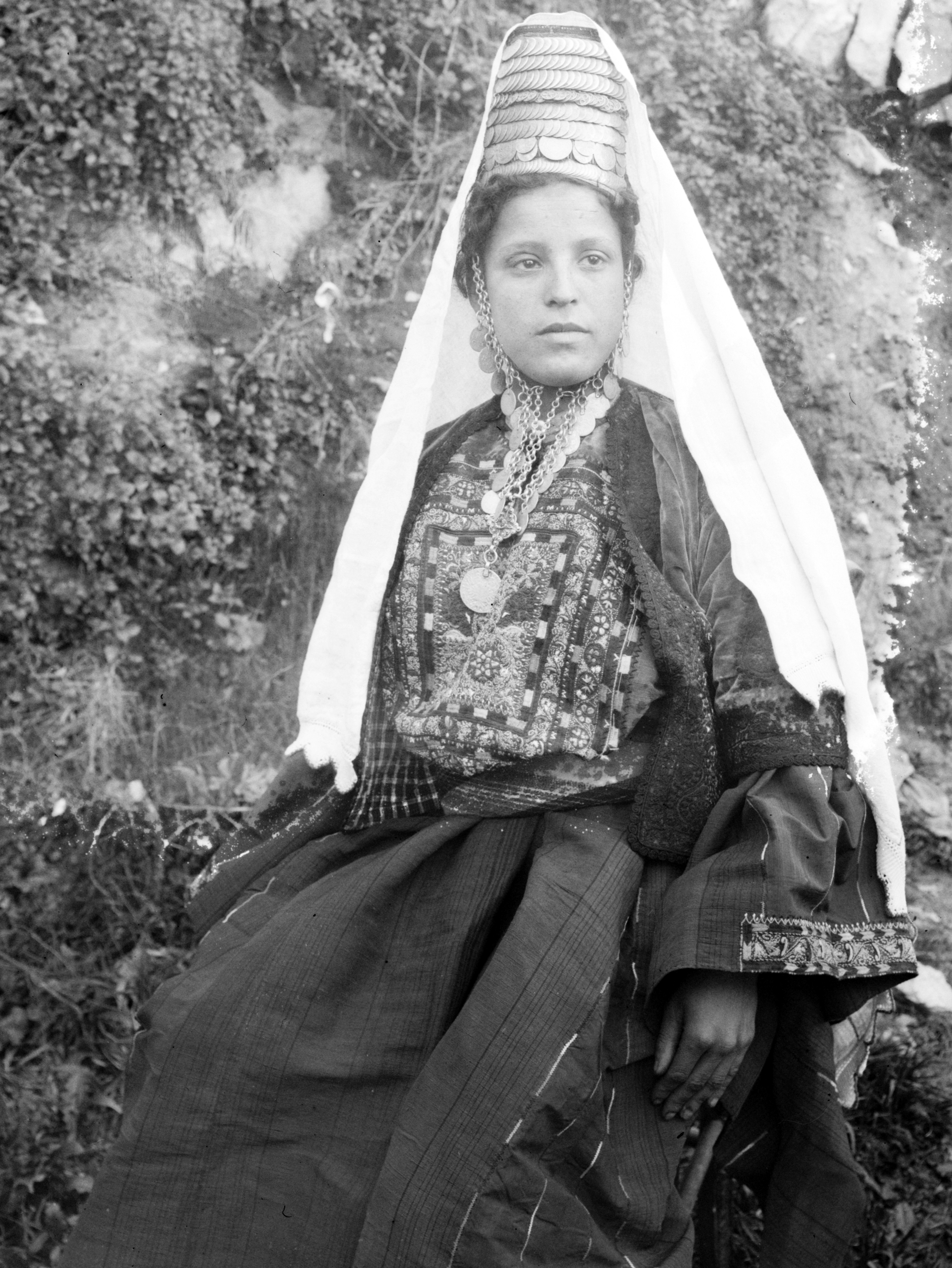 Woman in Bethlehem, Palestine